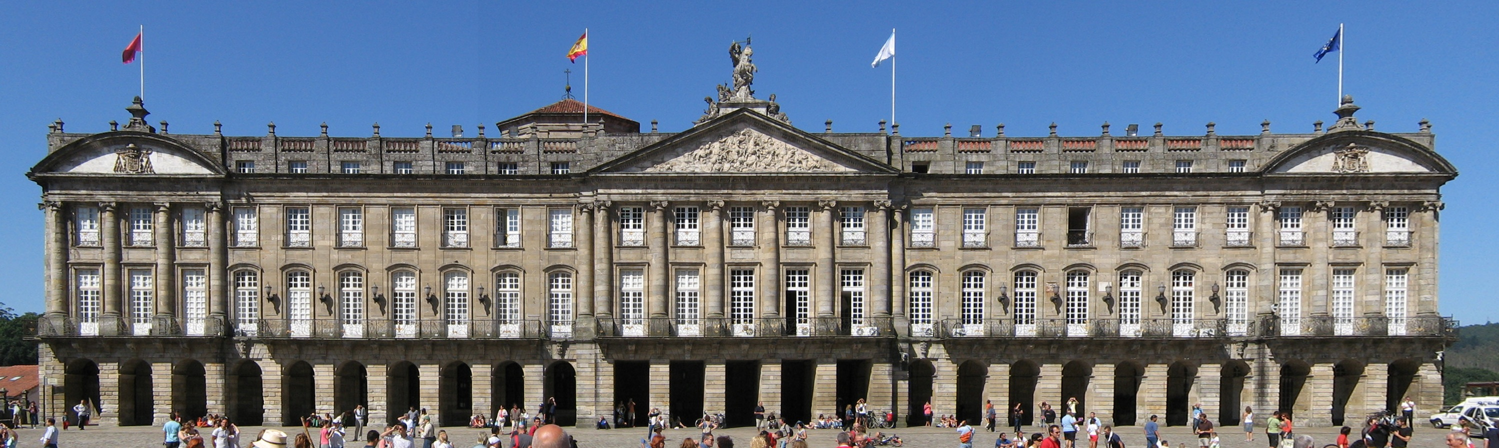 Pazo de Raxoi. Panorámica